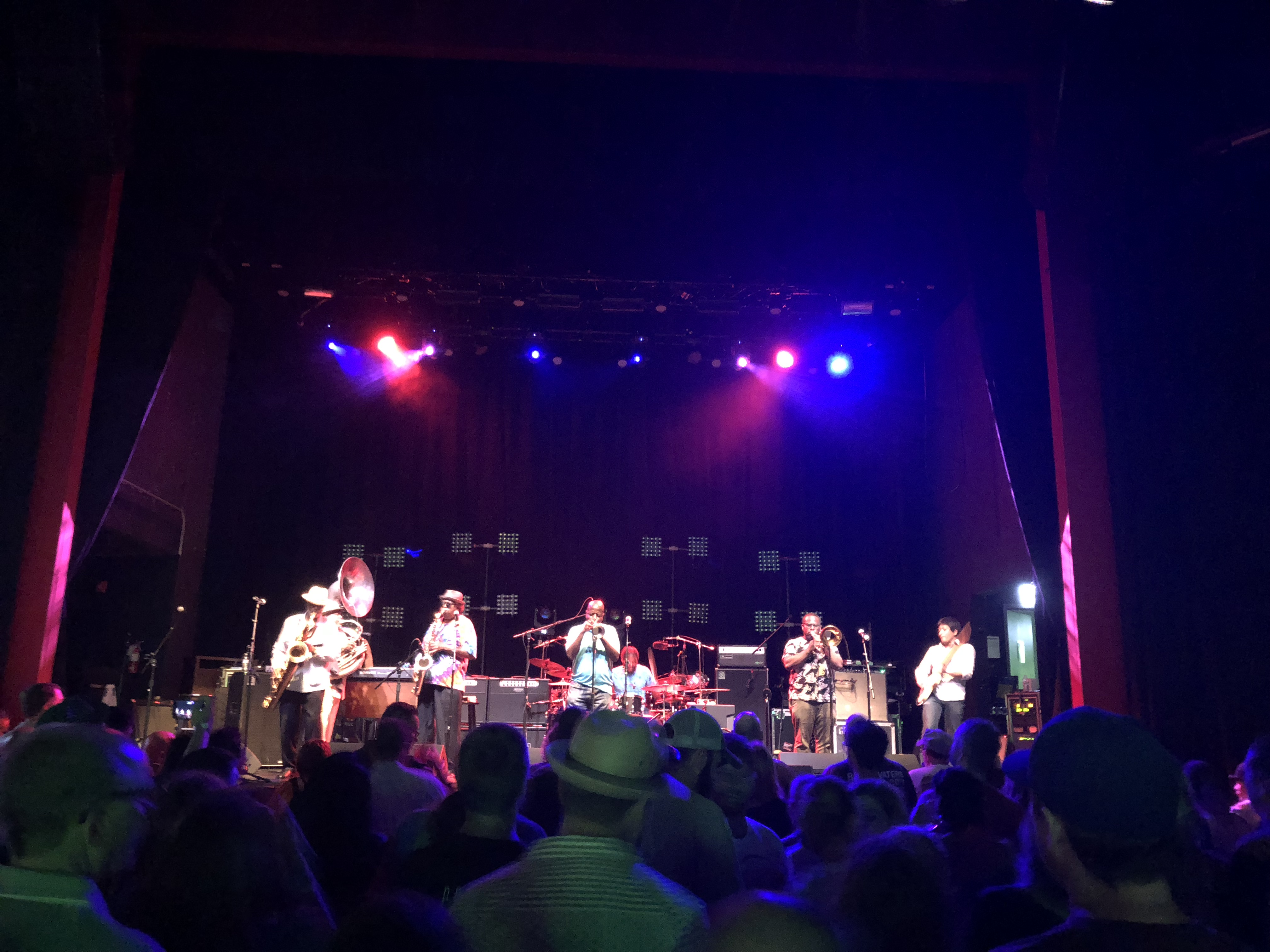 2018年5月のライブでの写真